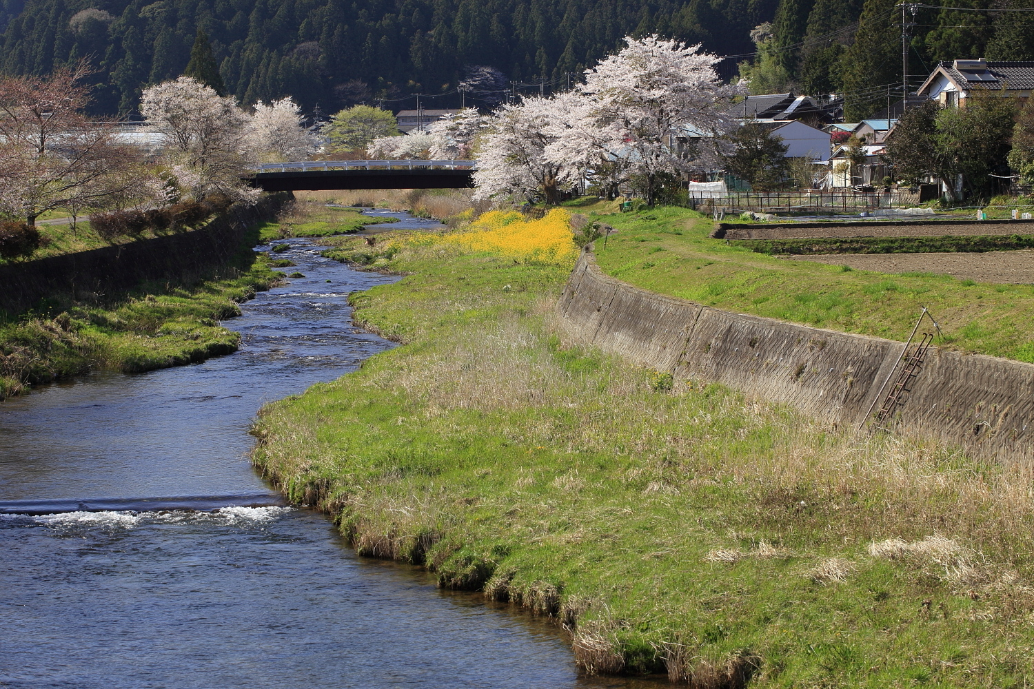 津具川（北設楽郡設楽町津具、2017年（平成29年）4月）